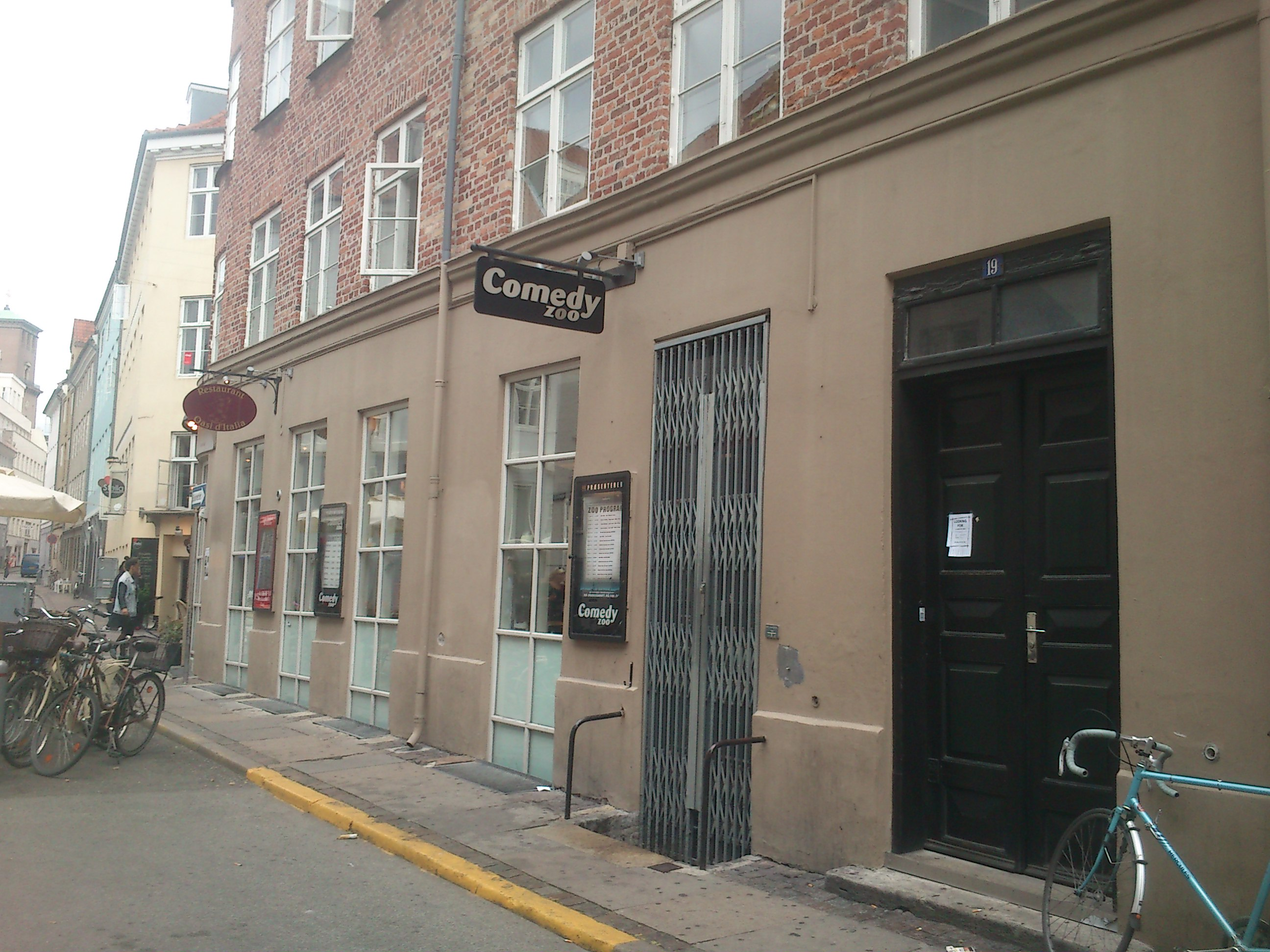 Et billede af Comedy Zoo i København